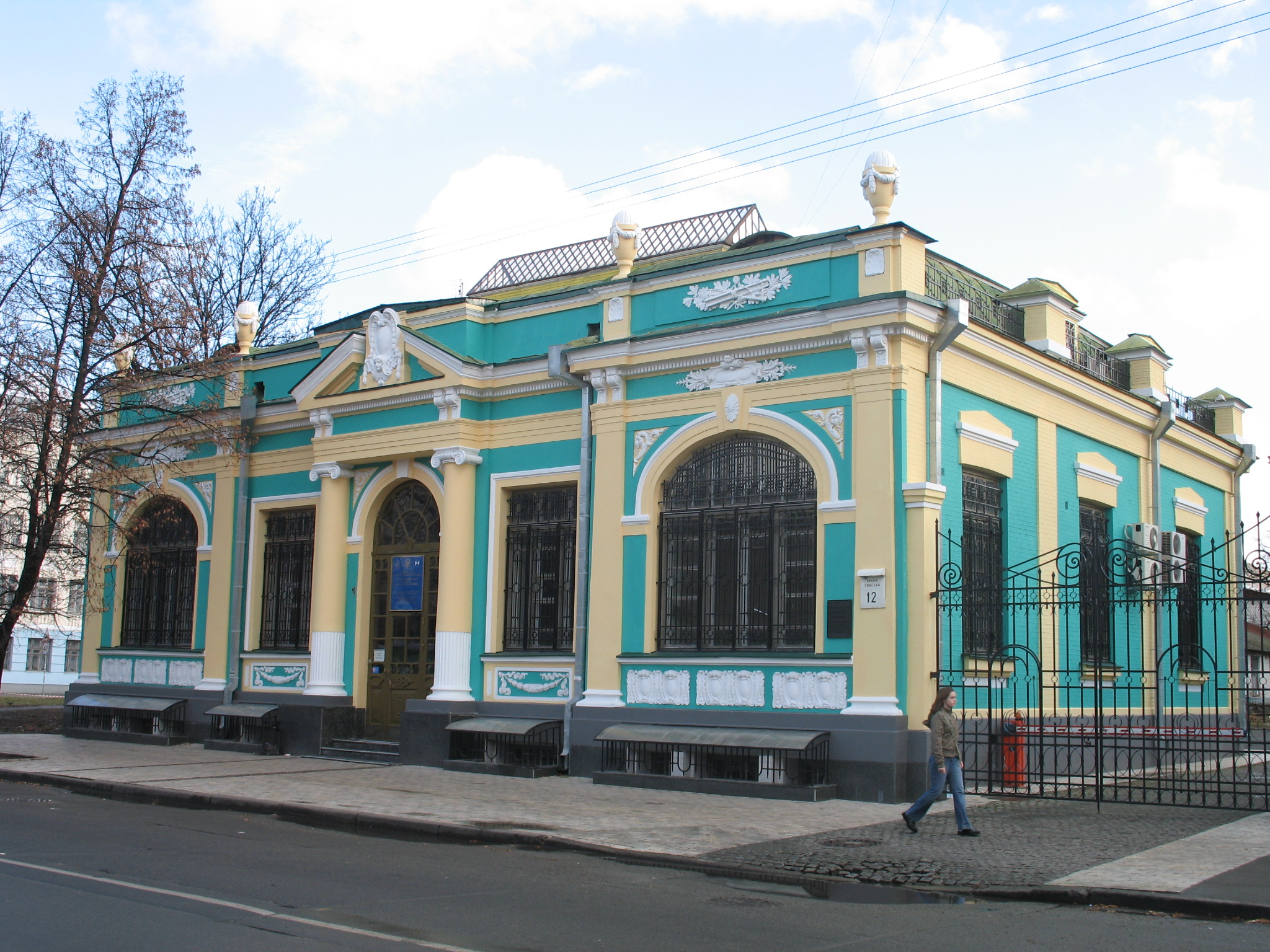 Будинок контори торгового дому «Апштейн Т. М. і сини», Київ, вул. Спаська, 12